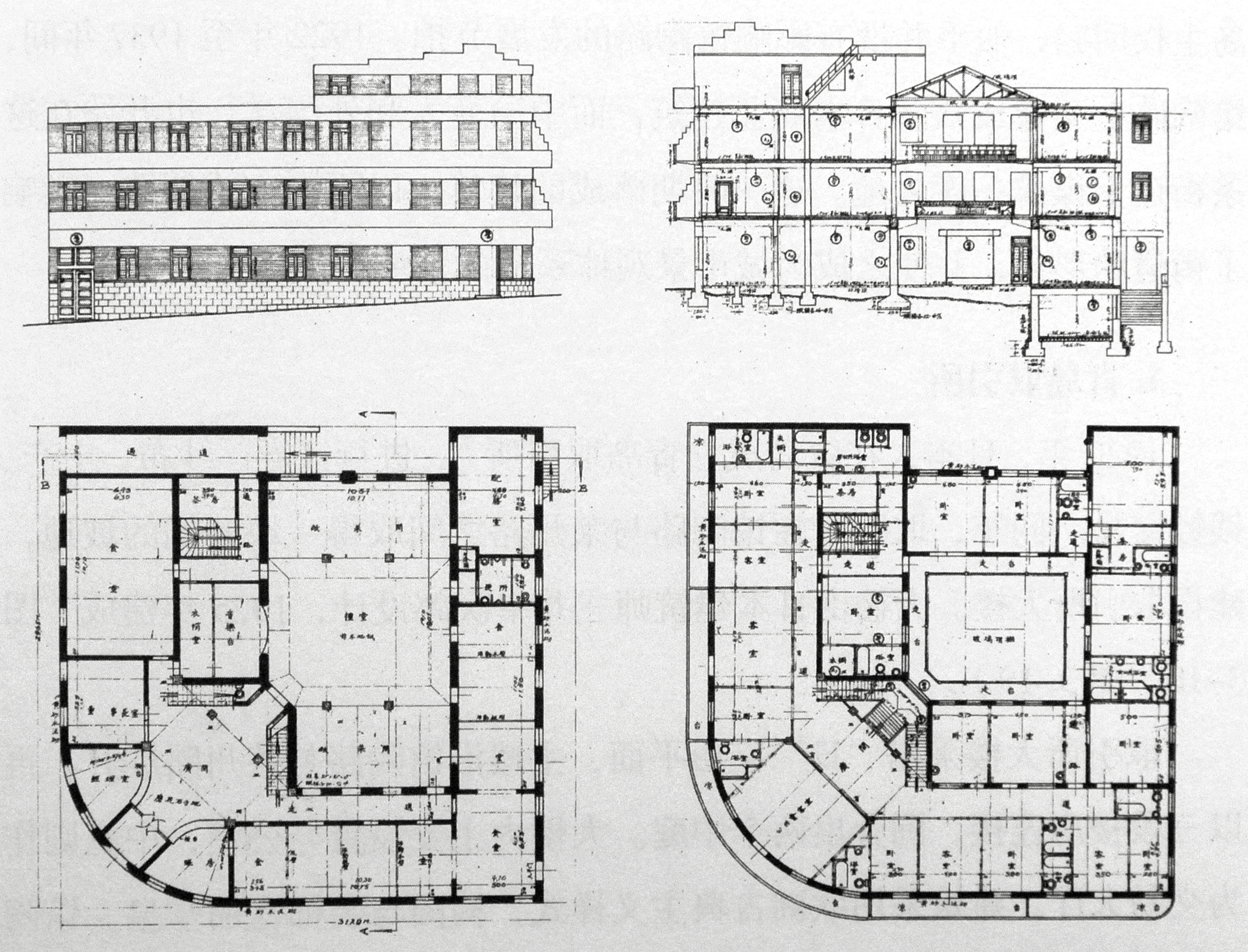 青岛新新公寓设计图